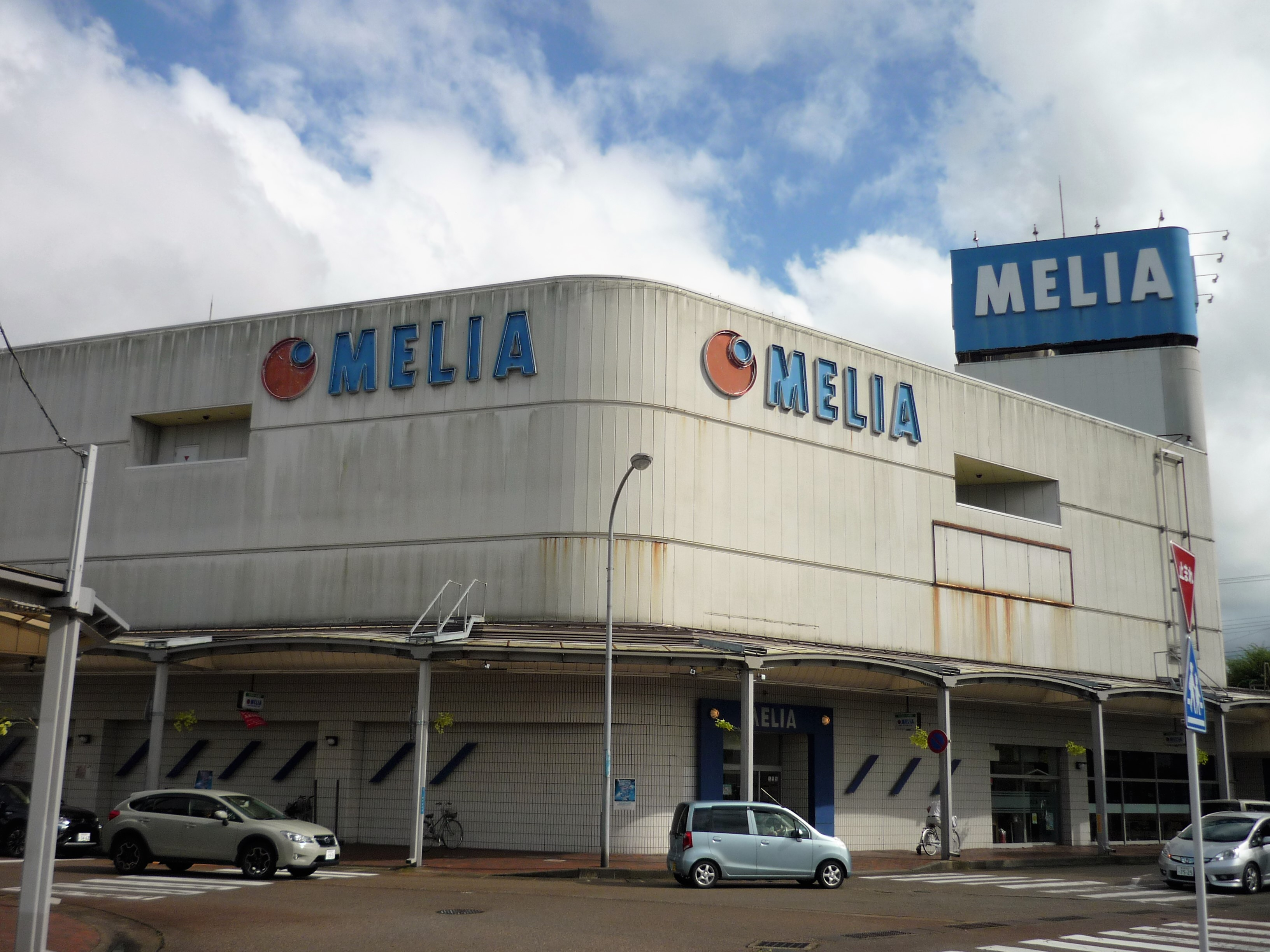 加茂ショッピングパーク メリア